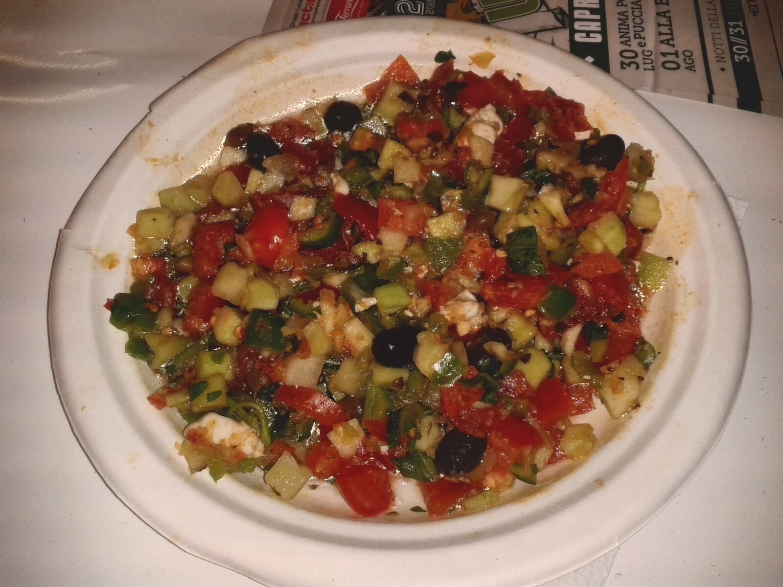 Insalata grika alla sagra di Martignano, ingredienti: meloncella pomodoro da insalata cipolla bianca peperoni cornetti peperoncino olive celline alla "capasa" rucola capperi sotto sale origano olio di oliva extra vergine formaggio "caciotta primo sale"